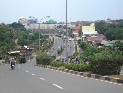 Jalan Ir.H.Juanda Depok